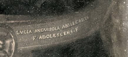 Pietro Manna, médico de Cremona